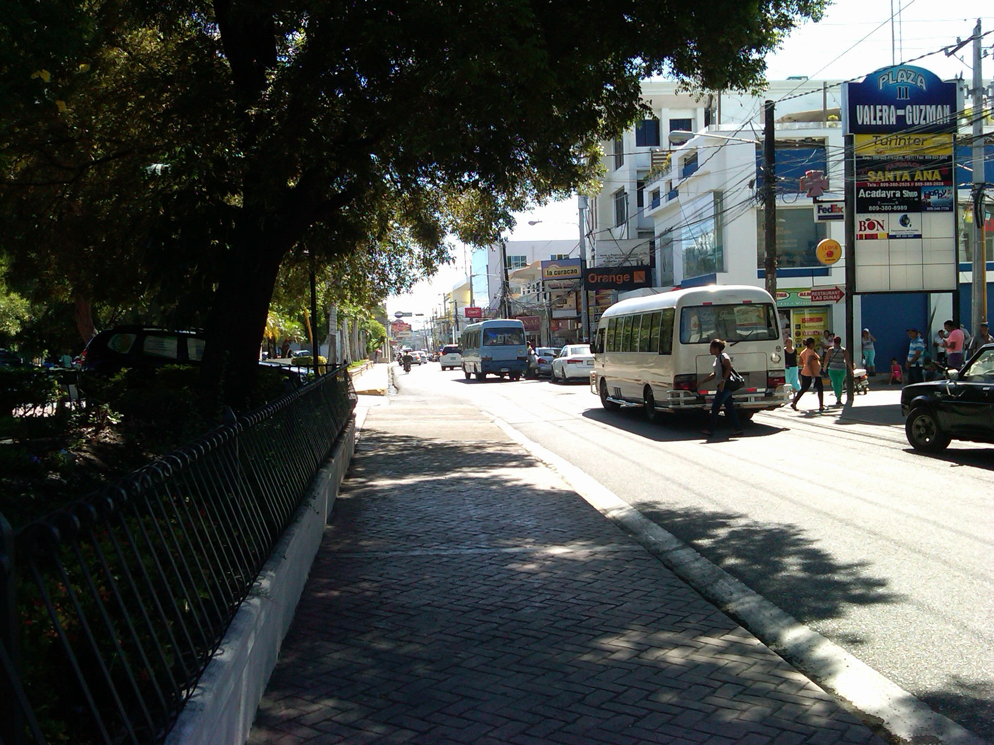 calle Presidente Billini